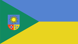 Прапор Теплицького району Вінницької області України